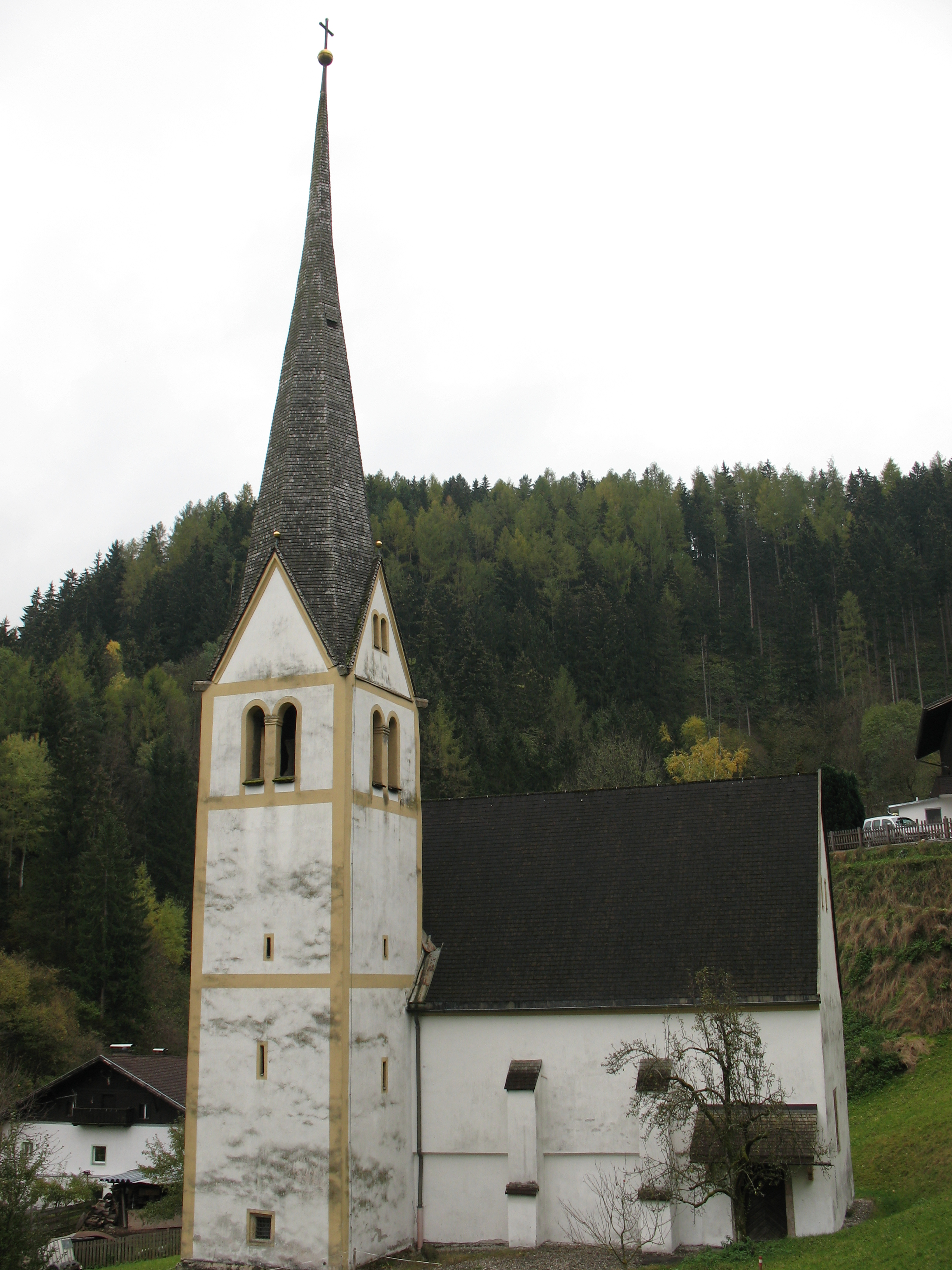 Kath. Filialkirche hl. Veit und ehem. Friedhofsfläche